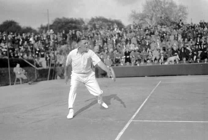 Najuch, wieder Berufs-Tennismeister! Bei den Tennismeisterschaften der Berufsspieler auf den Rot-weiss-Plätzen in Berlin-Grunewald siegte Najuch hervorragend.